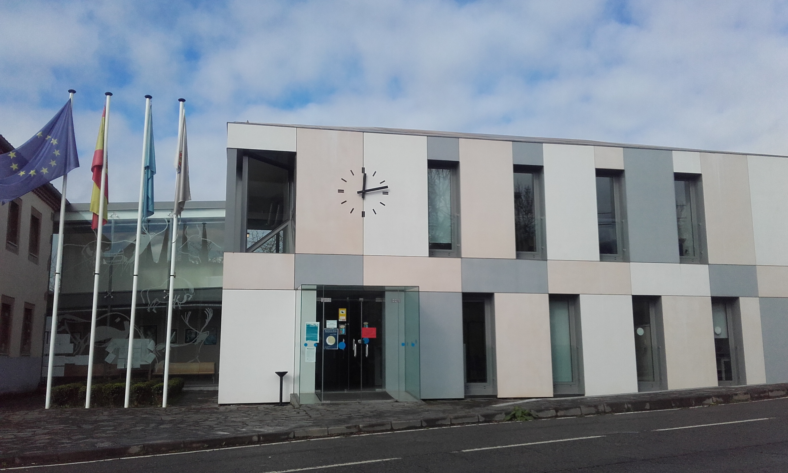 Ayuntamiento de Candamo.